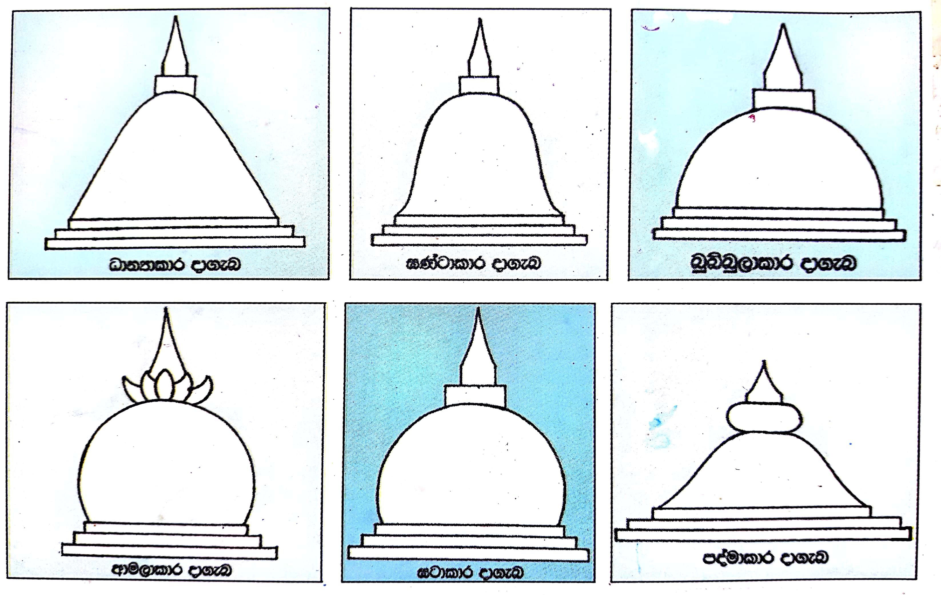 සිංහල: ශ්‍රි ලංකාවේ ස්තූප වර්ග